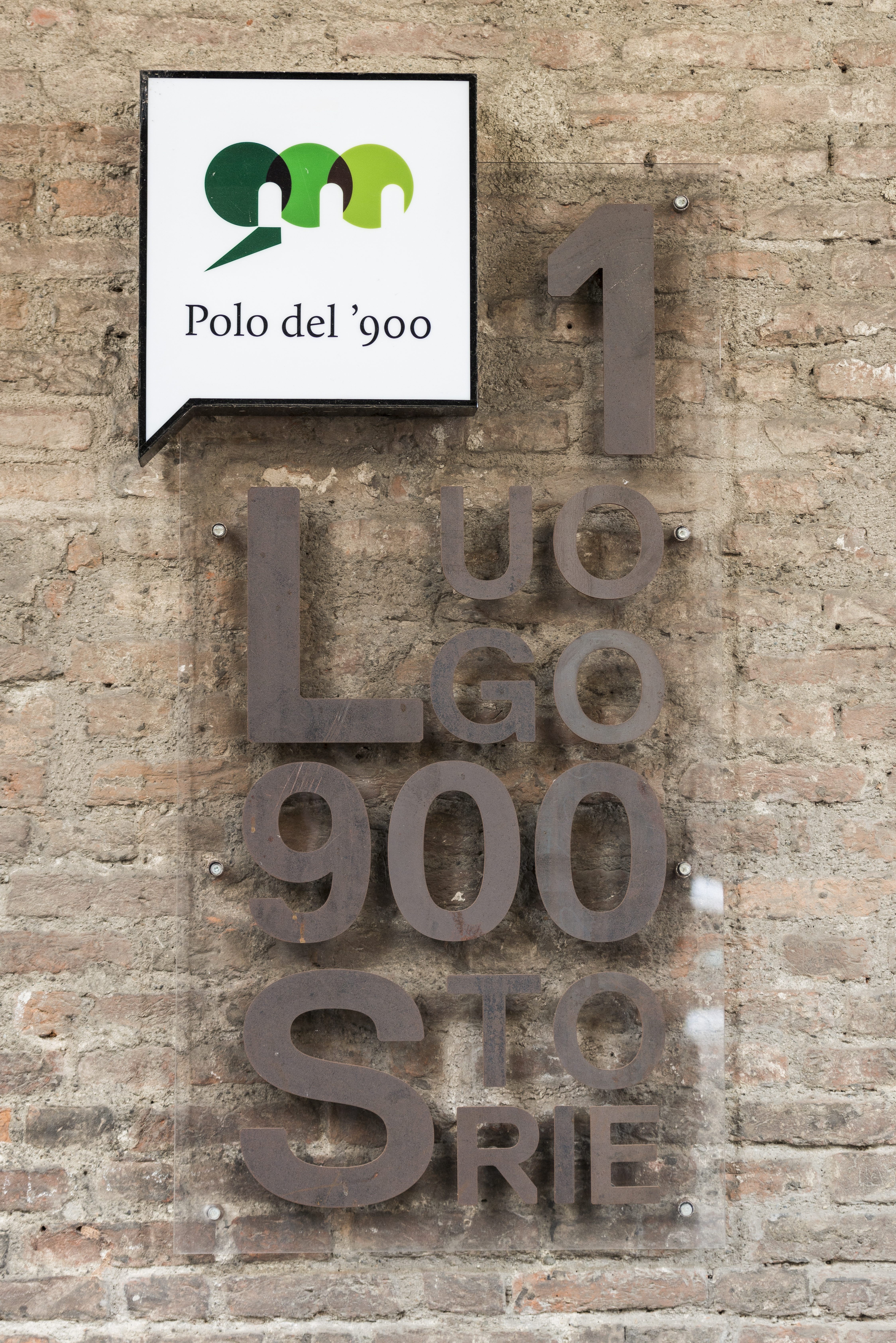 Il logo del Polo del '900 all'entrata dei palazzi.